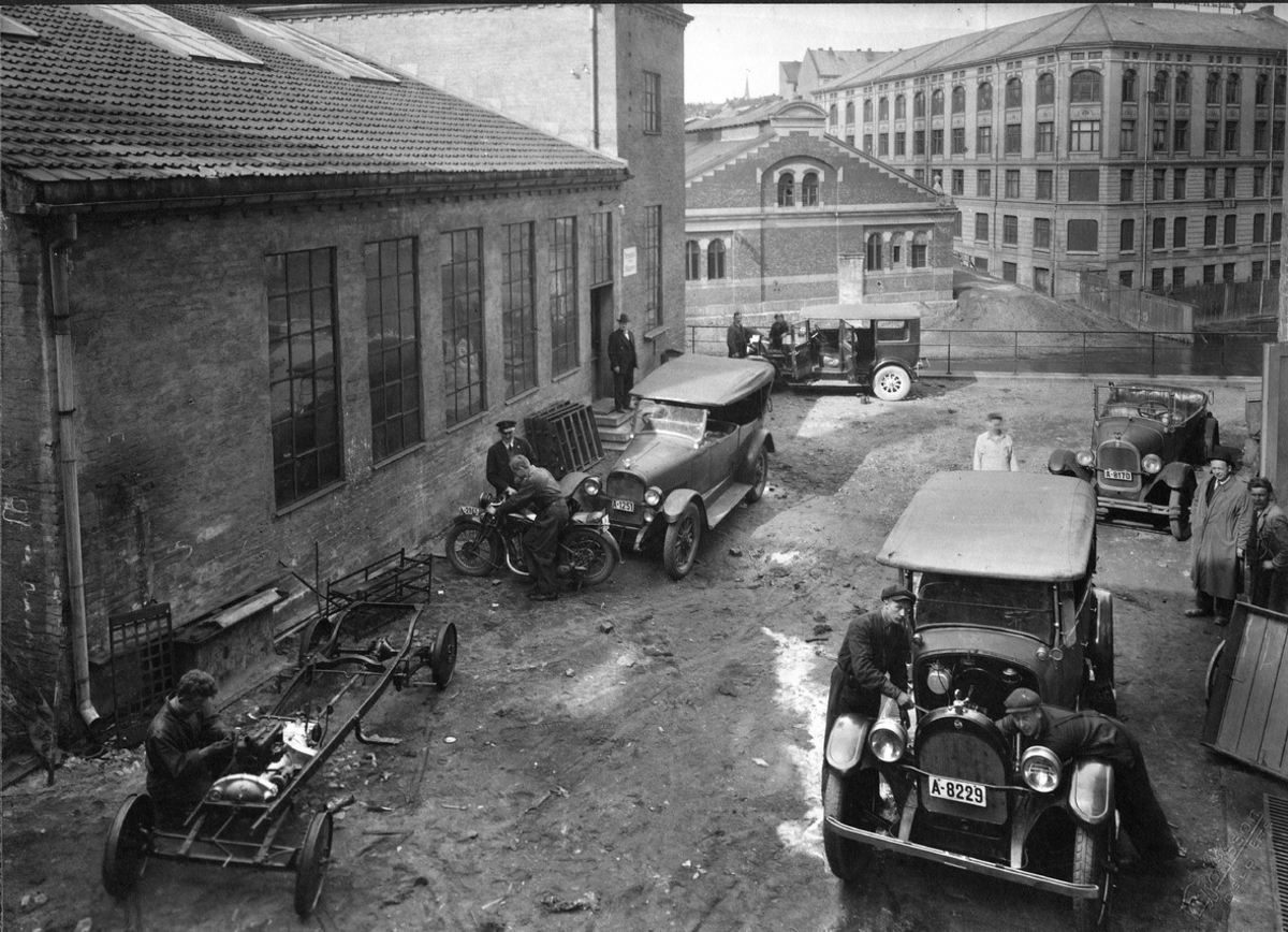 Autoskoleelever i arbeid på skolens gårdsplass